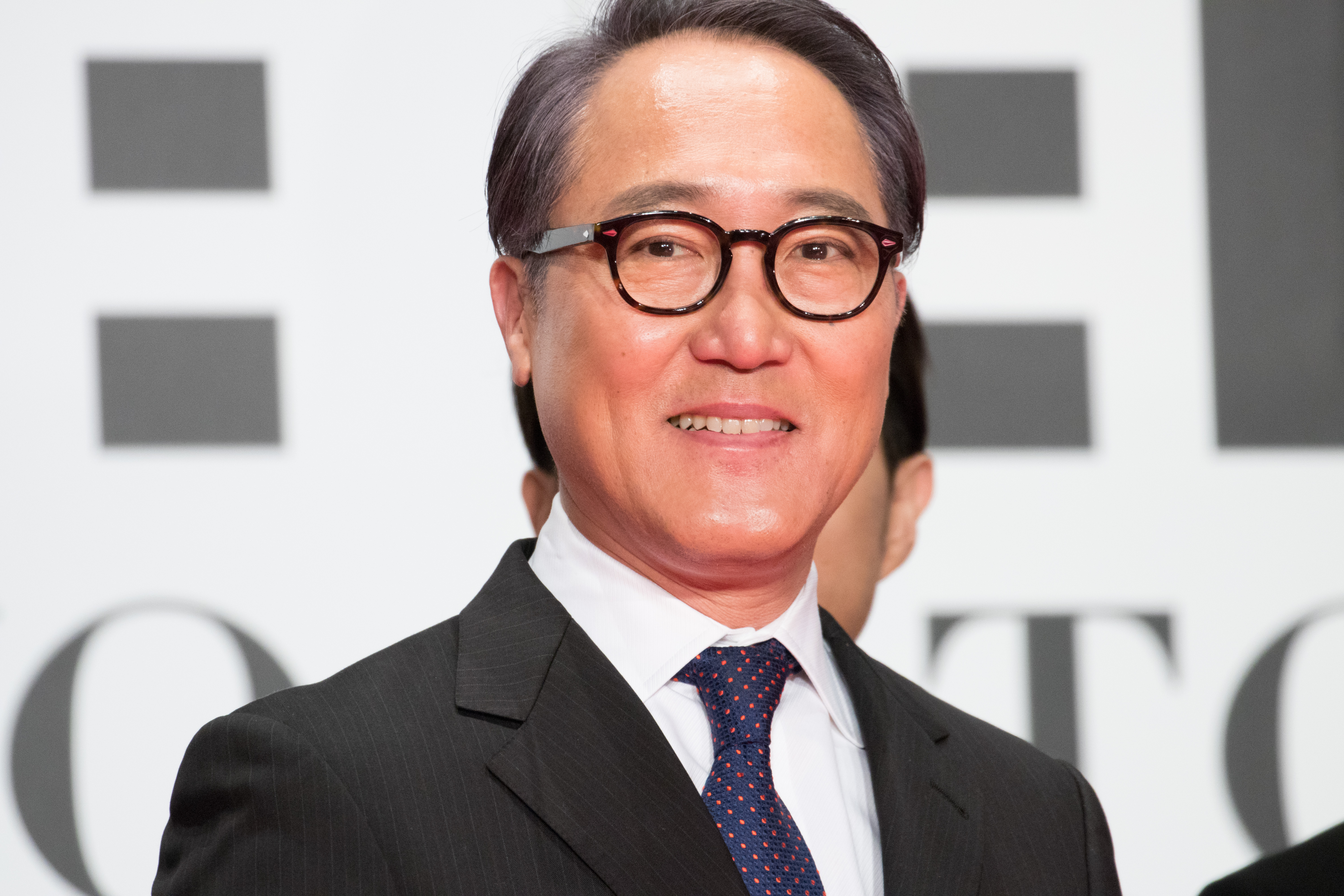 第29回 東京国際映画祭 オープニングセレモニー 佐野史郎 (雪女)